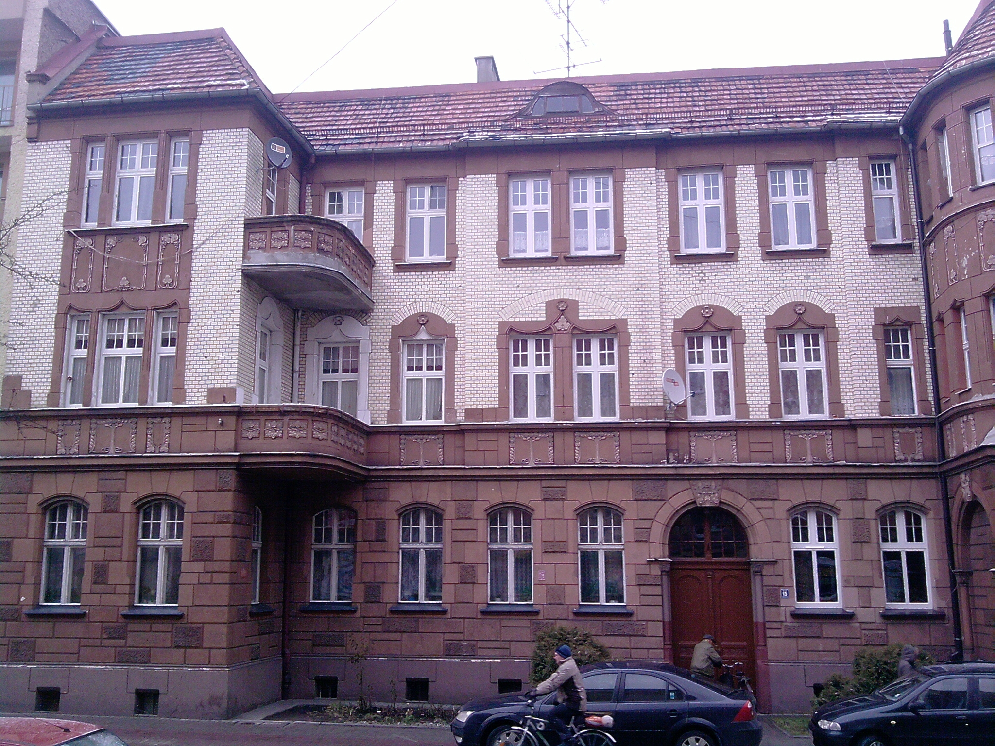 Racibórz, ul. Ogrodowa 15 - kamienica, 1906-1909 (zabytek nr A/1520/93 z 30.04.1993)